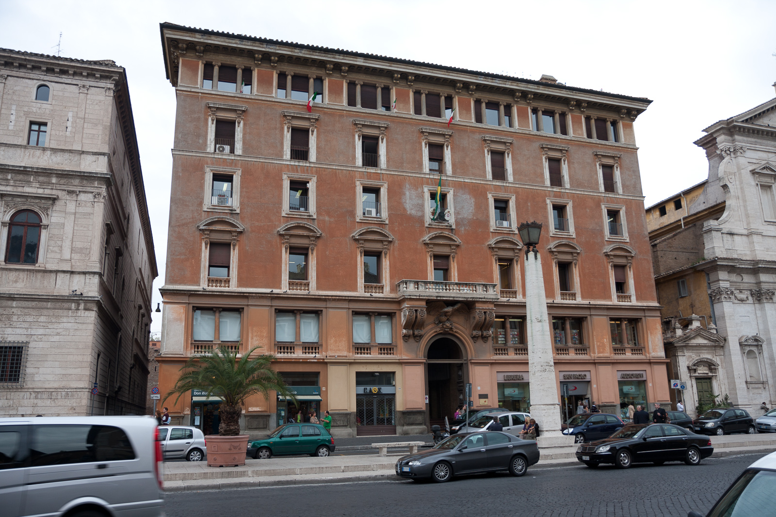 Rione XIV Borgo, Roma, Italy